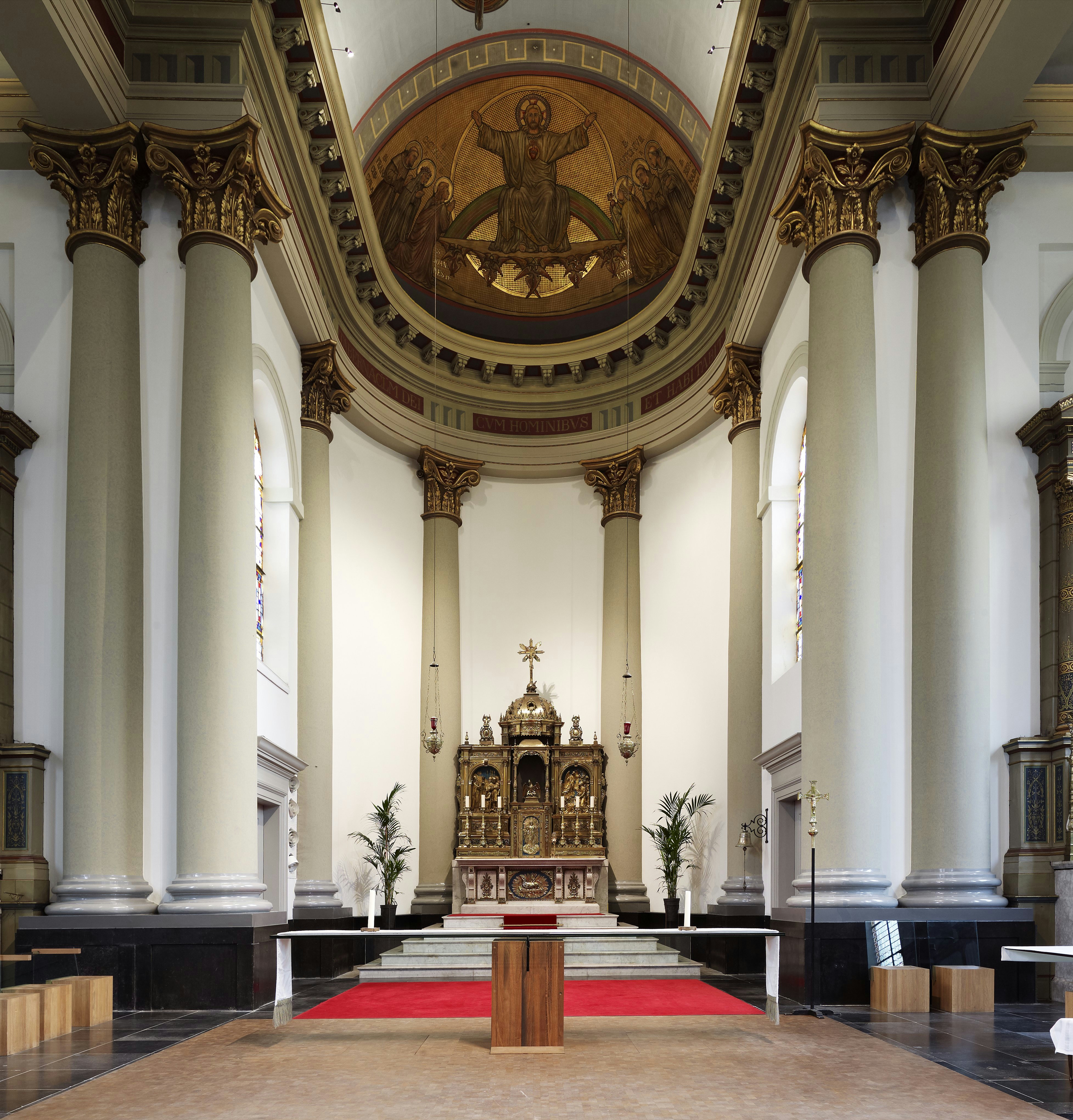 Sint Antoniuskerk: Interieur, overzicht van het koor met het hoofdaltaar